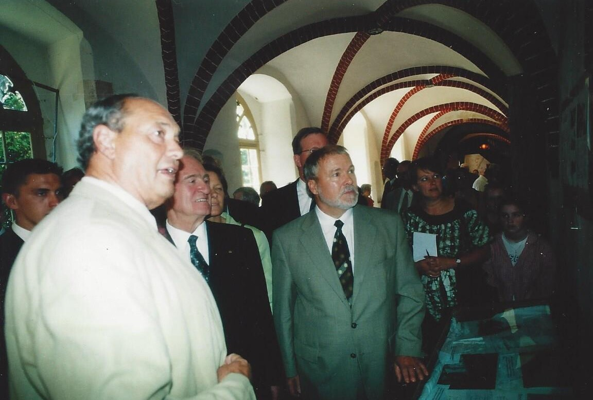 Horst Alsleben führt Bundespräsident Johannes Rau und Ministerpräsident Harald Ringstorff durch das Kloster Dobbertin